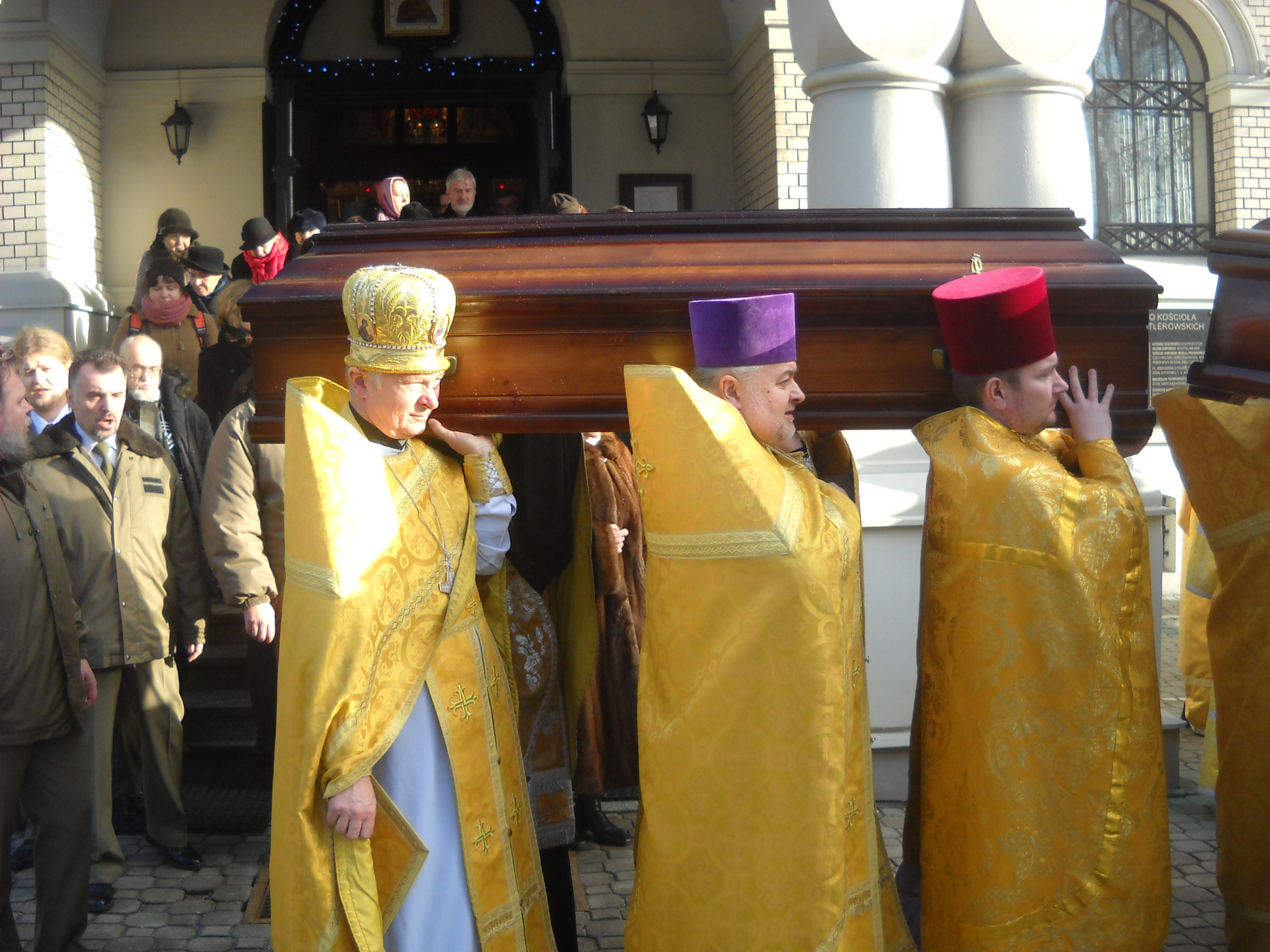 Hierarchowie i duchowieństwo w czasie powtórnego pogrzebu biskupów Sawy (Sowietowa) i Mateusza (Siemaszki) na cmentarzu prawosławnym w Warszawie.